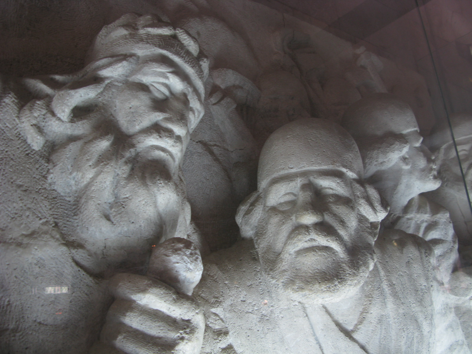 آرامگاه فردوسیسنگ‌تراشه‌ها حوالی ۱۳۴۷ تا ۱۳۵۰ شمسی ساخته [و رونمایی؟] شده‌اند، لذا در حال حاضر در مالکیت عمومی قرار دارند. انتشار عکس‌های گرفته‌شده از آن‌ها طبق قانون حق نشر ایران بلااشکال است